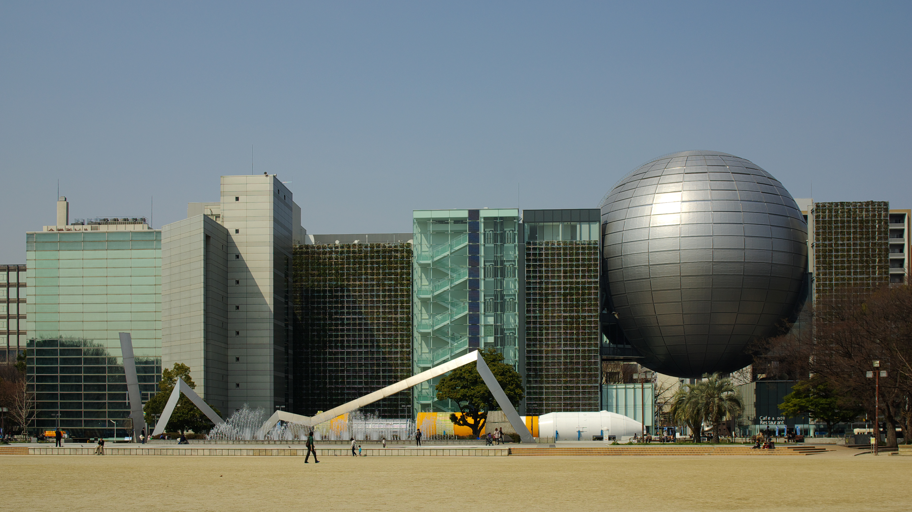 名古屋市科学館（新館・屋外展示完成後） PEMTAX K10D + smc PENTAX-A 1:2.8 28mmで撮影。16:9にトリミング、デジタルシフト使用